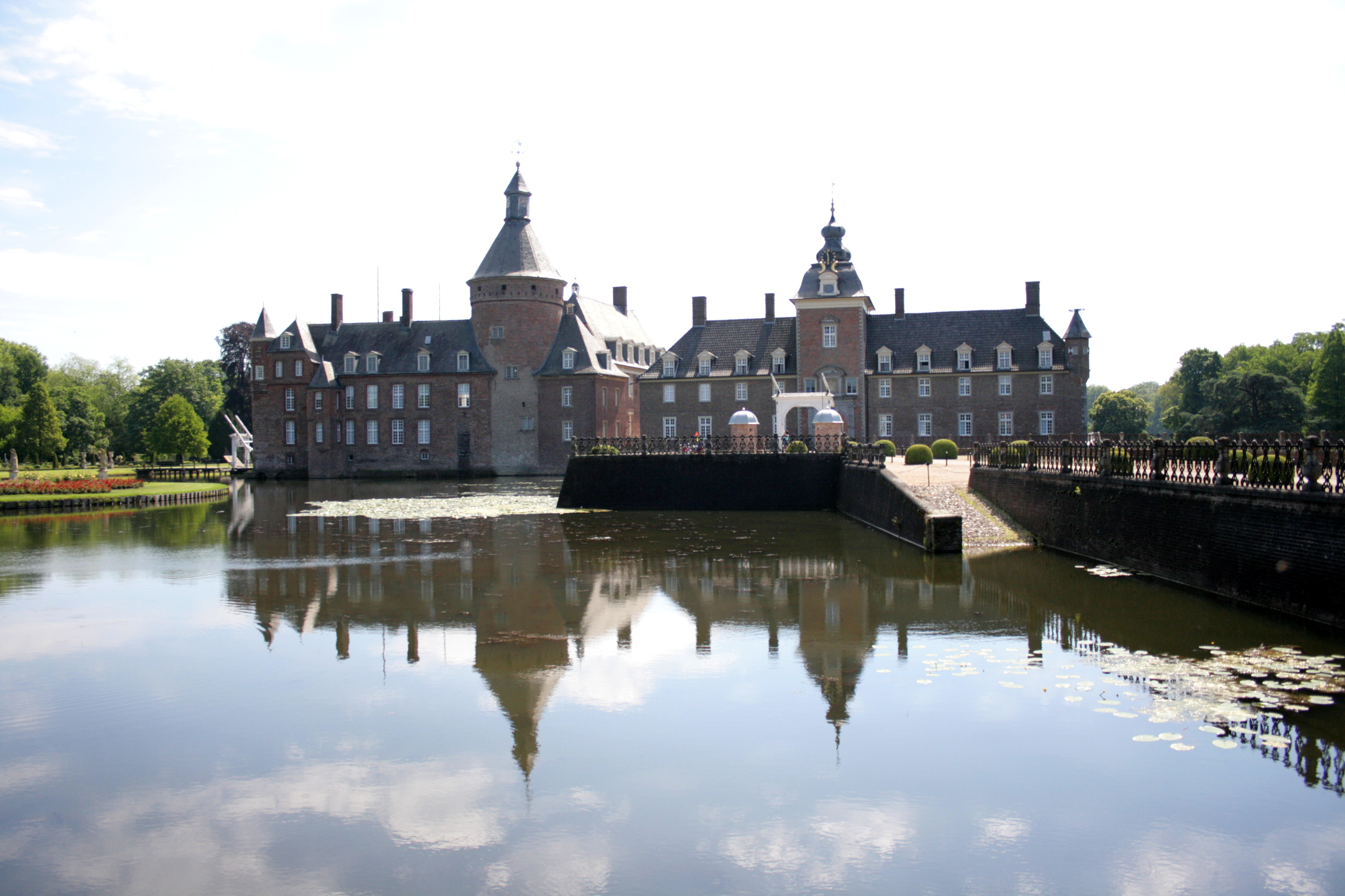 Wasserburg Anholt in Anholt, Isselburg